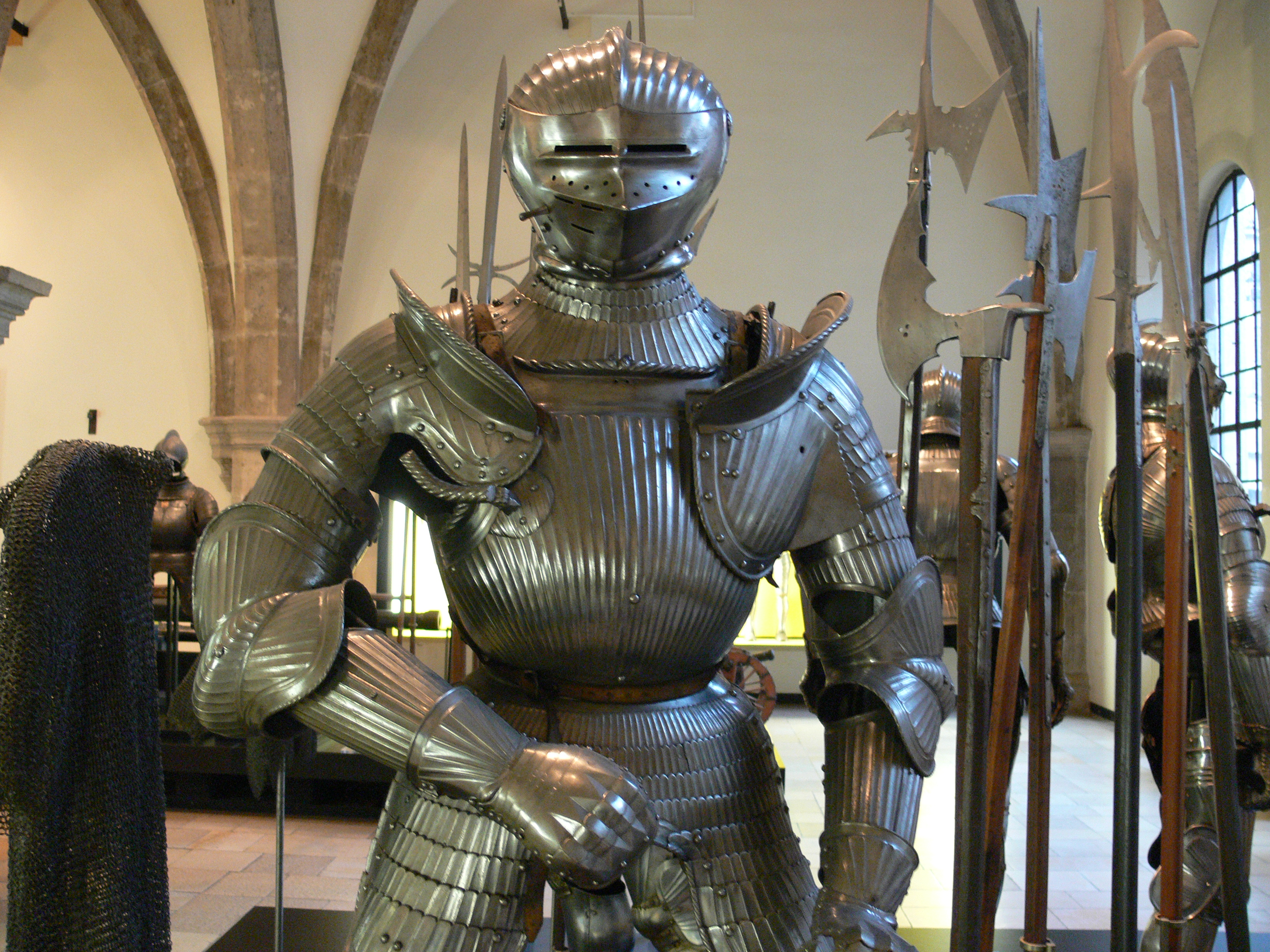 Harnisch; Bayerisches Nationalmuseum, München